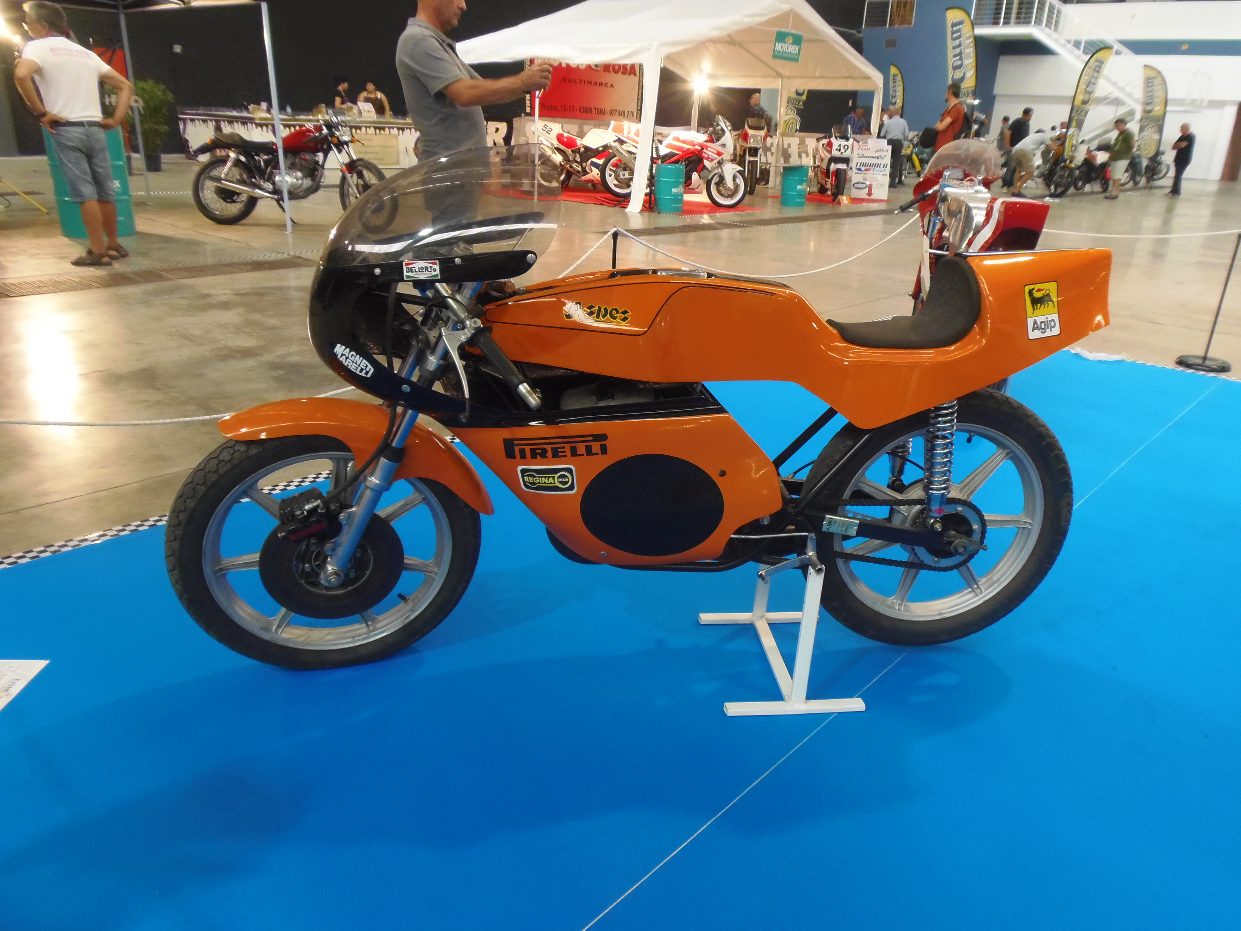 Aspes Yuma 125, circa 1980